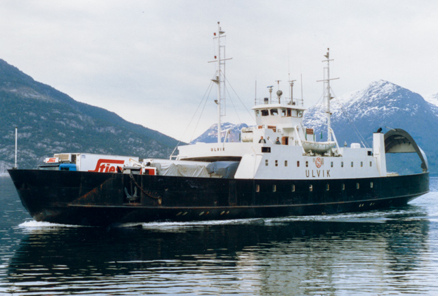 Ulvik i rute Kvanndal-Utne-Kinsarvik i 1987